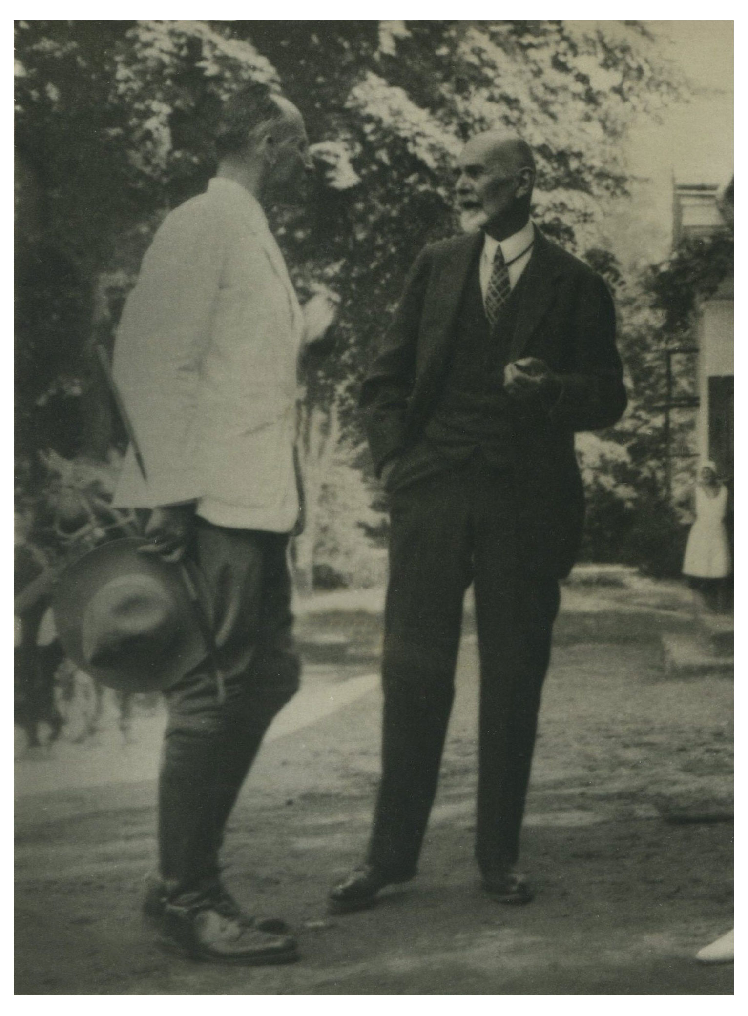 Leon Aleksander Sapieha (1883-1944) i Kazimierz Ostaszewski (1864-1948), Bachórzec u Krasickich, liptec 1935